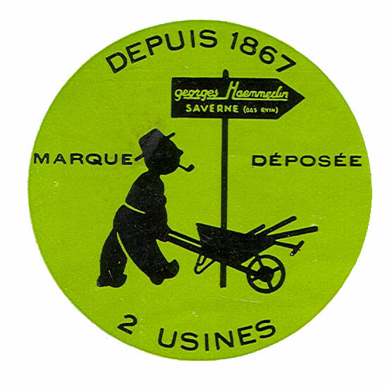 Ancien logo Haemmerlin 1950